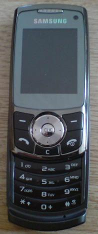 telefon komorkowy samsung l760